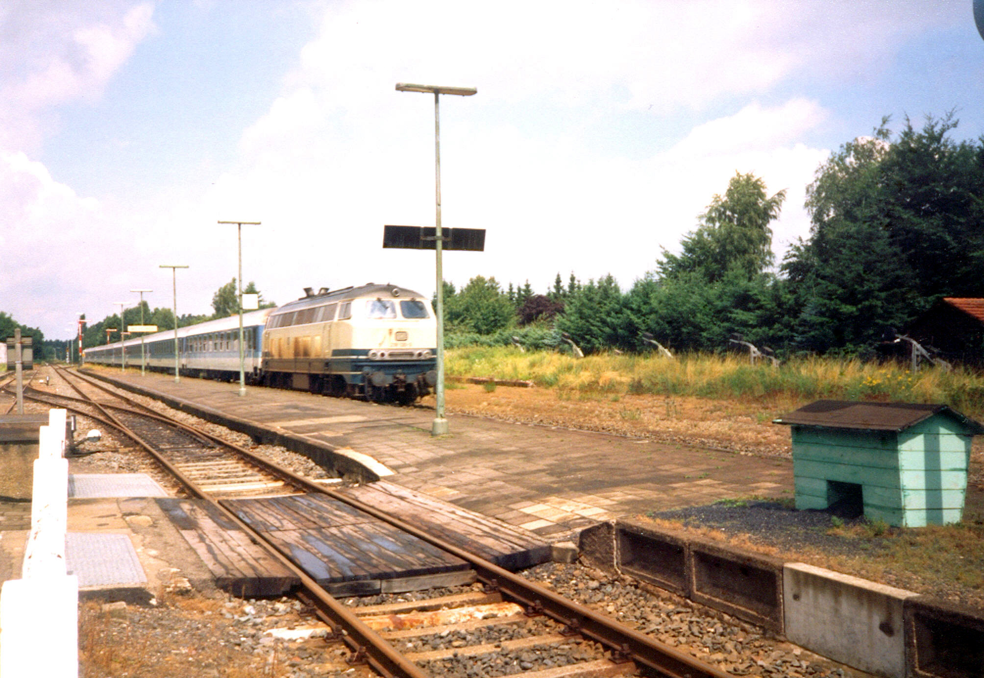 Eine Diesellok der Baureihe 218 zieht im Juli 1993 einen umgeleiteten IR durch Hövelhof